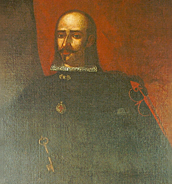 Baltasar de la Cueva, Conde de Castellar y Virrey del Perú